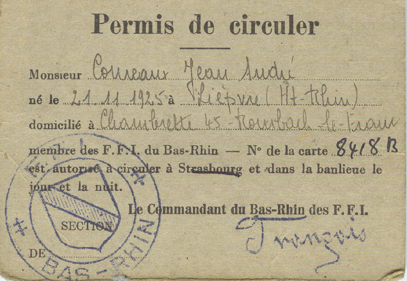 Permis de circuler des F.F.I attribué à André Conreaux de Rombach-le Franc en 1943